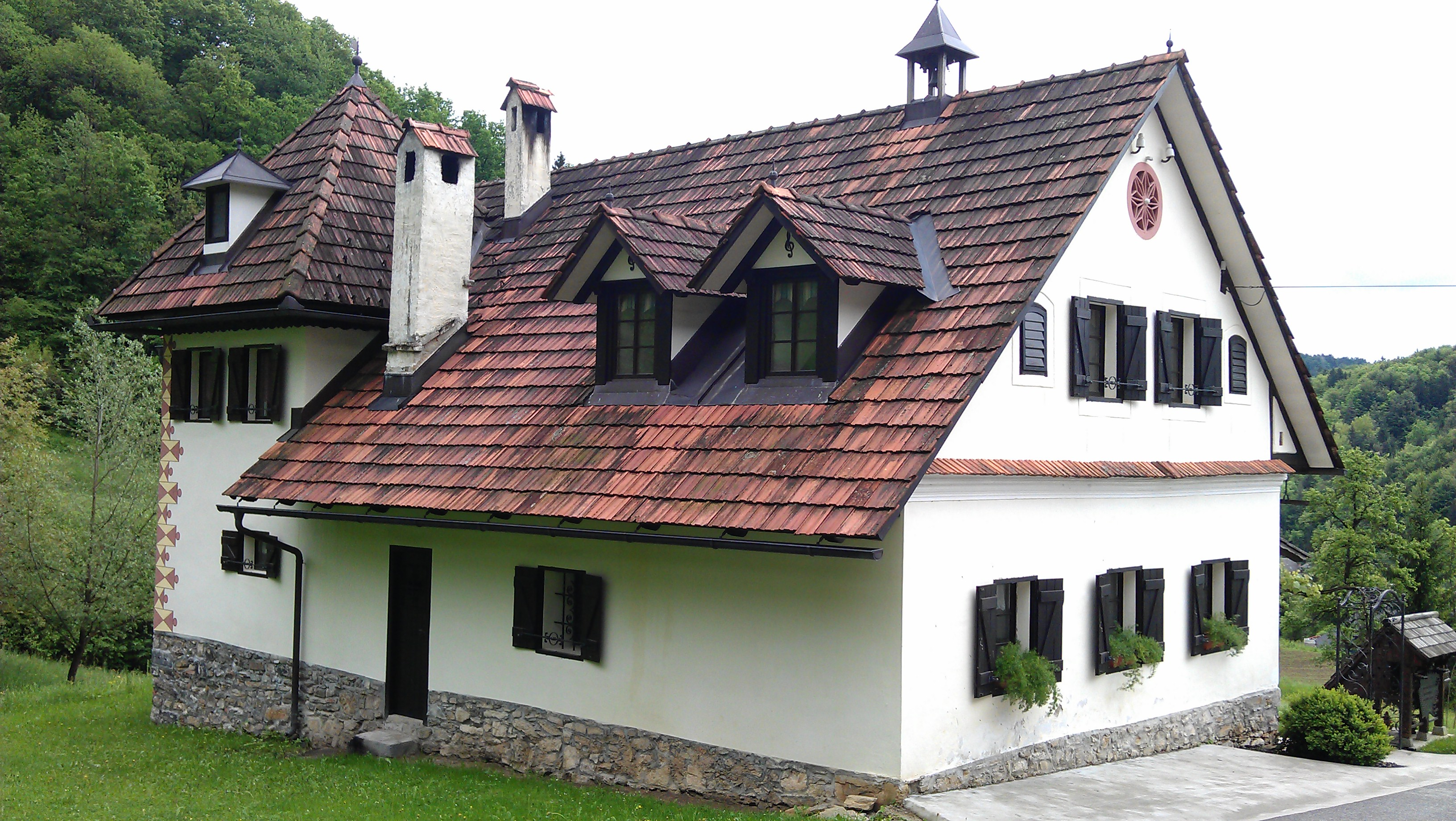 Železnikova hiša na Vrzdencu